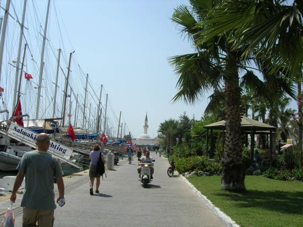 Marina in Bodrum, Turkey; oiginally: Przystań w Bodrum, Turcja.